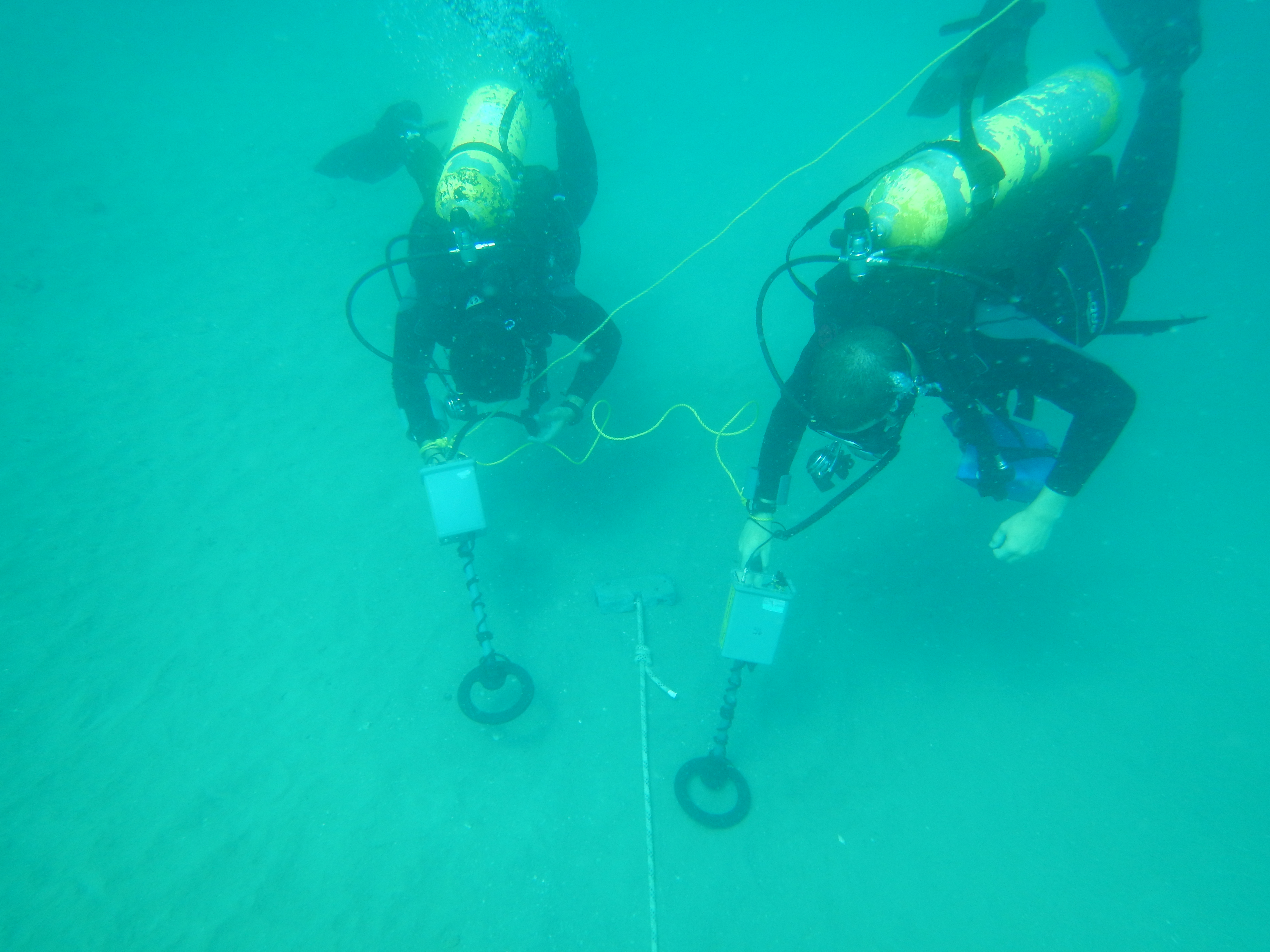 צוללי ילת"מ במהלך חיפושים